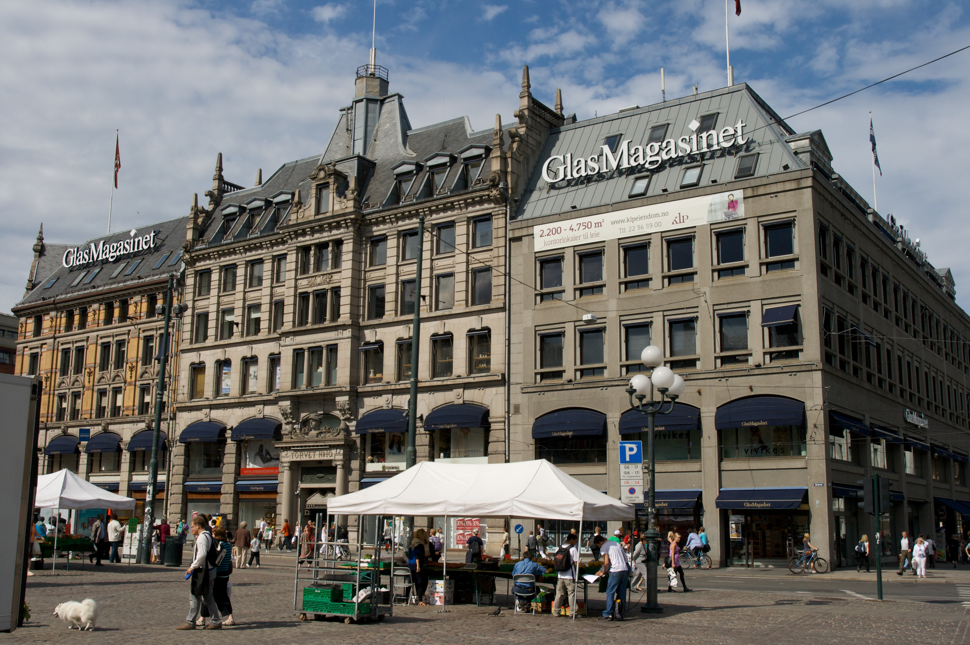 GlasMagasinet. Stortorvet i Oslo. Bygningen til venstre er av Ove Ekman, den i midten av Harald Olsen og den nye til høyre av Frithjof Stoud Platou.